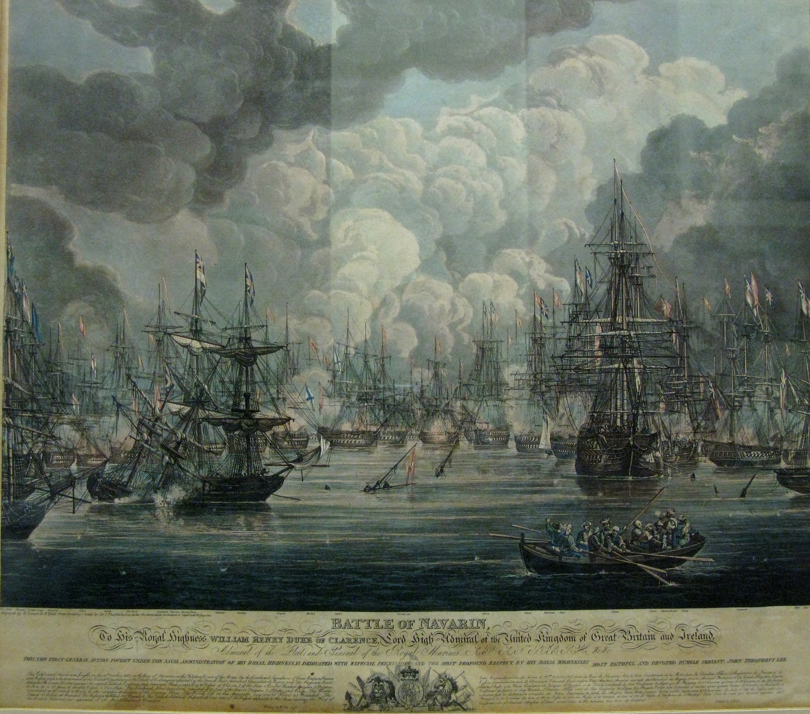 Greek: Μάχη του ΝαβαρίνουBattle of Navarinotitle QS:P1476,el:"Μάχη του Ναβαρίνου" label QS:Lel,"Μάχη του Ναβαρίνου" label QS:Len,"Battle of Navarino"